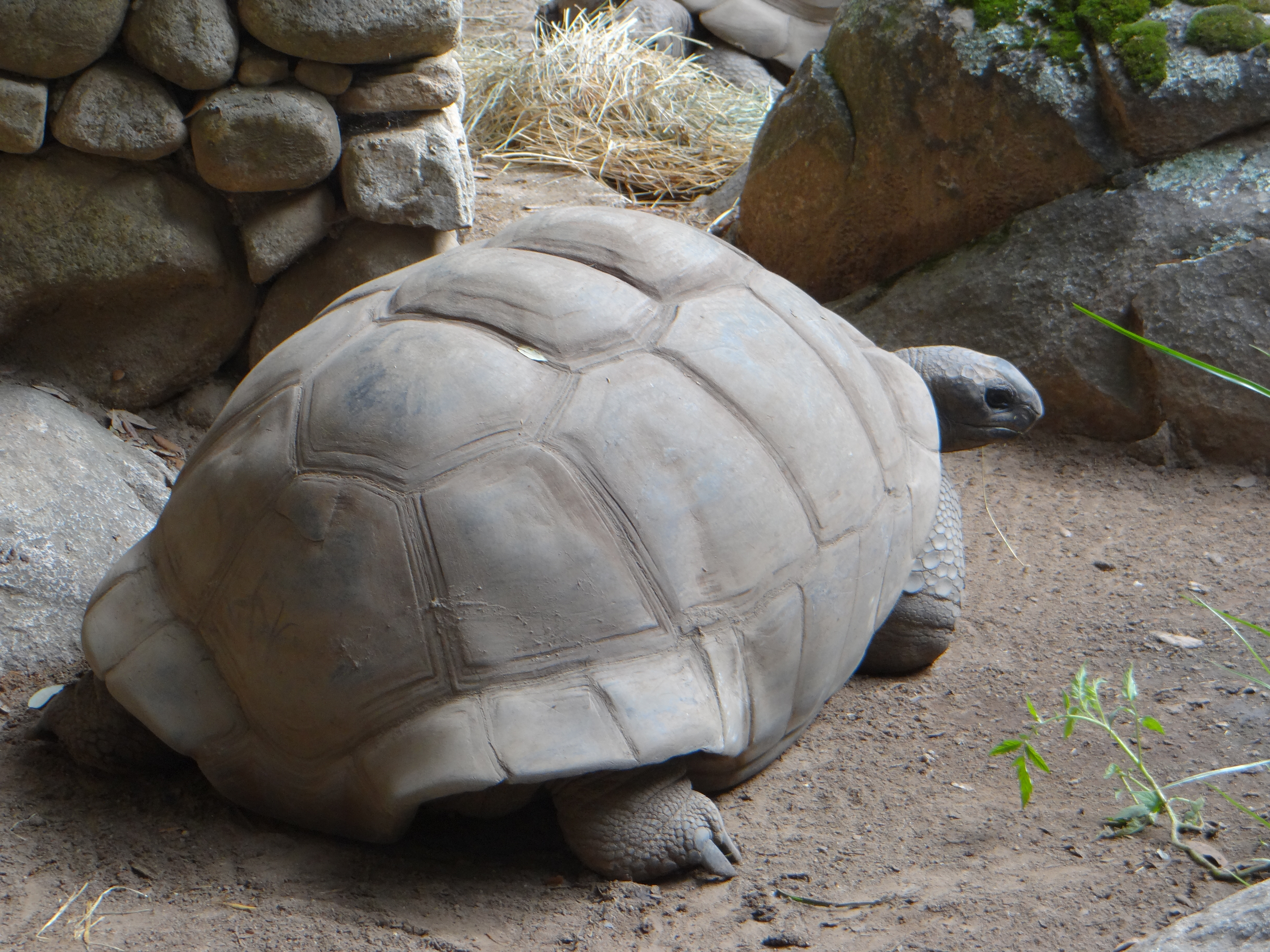 Tortue géante des Seychelles (Aldabrachelys gigantea, nommée Dipsochelys elephantina) au parc A Cupulatta, Corse